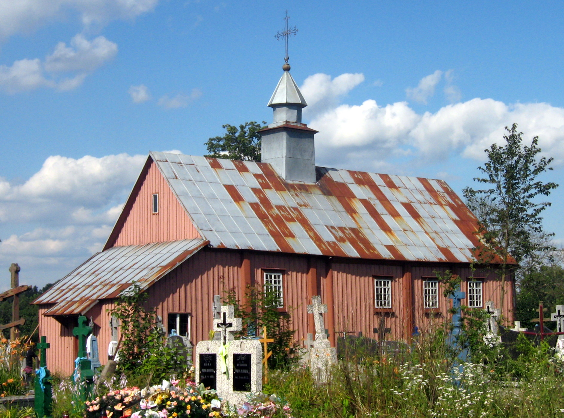 Kaplica cmentarna pw. św. Jerzego w czasie remontu w 2009 roku na cmentarzu w Łosince.